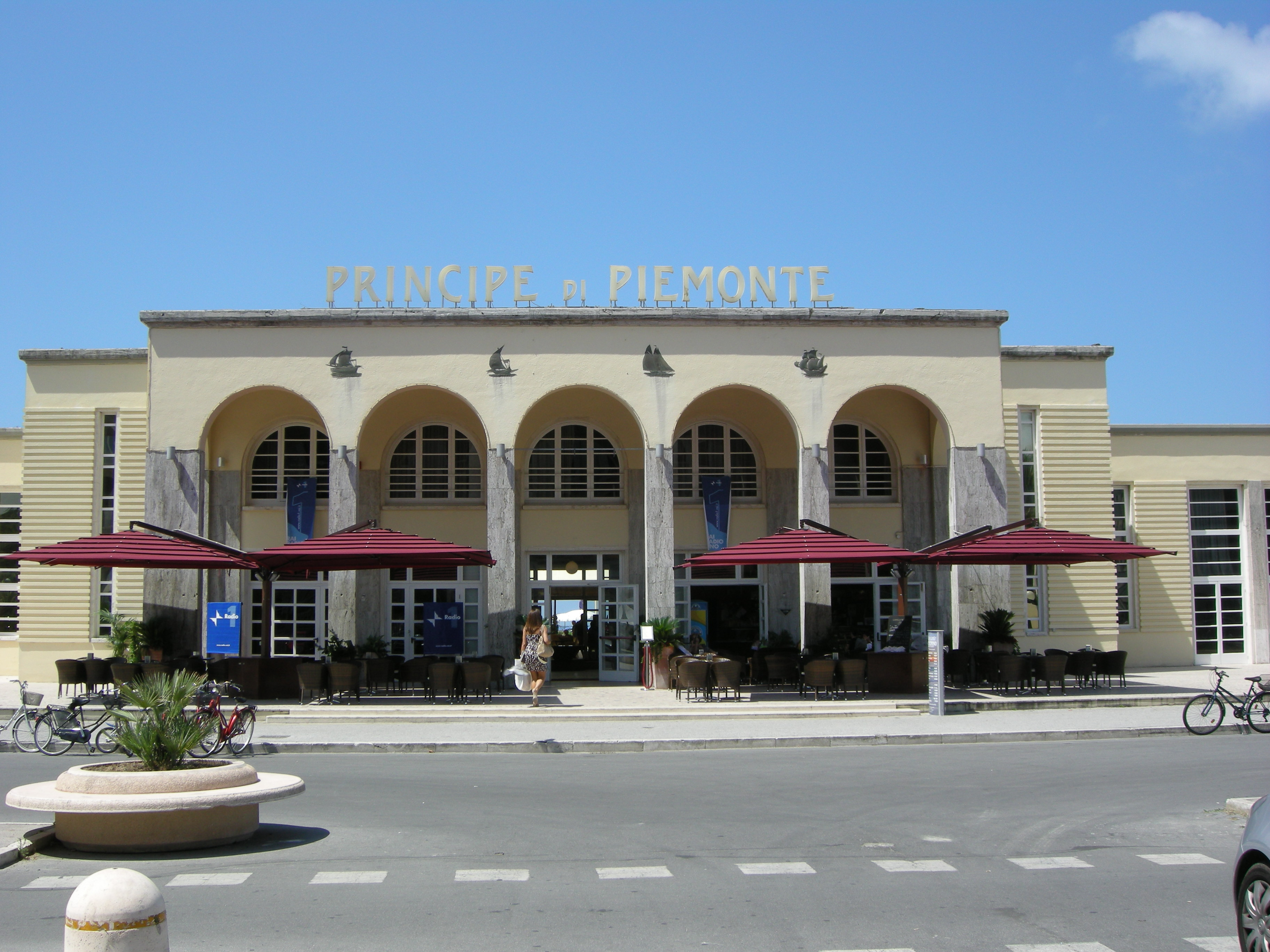 Bagno principe di piemonte